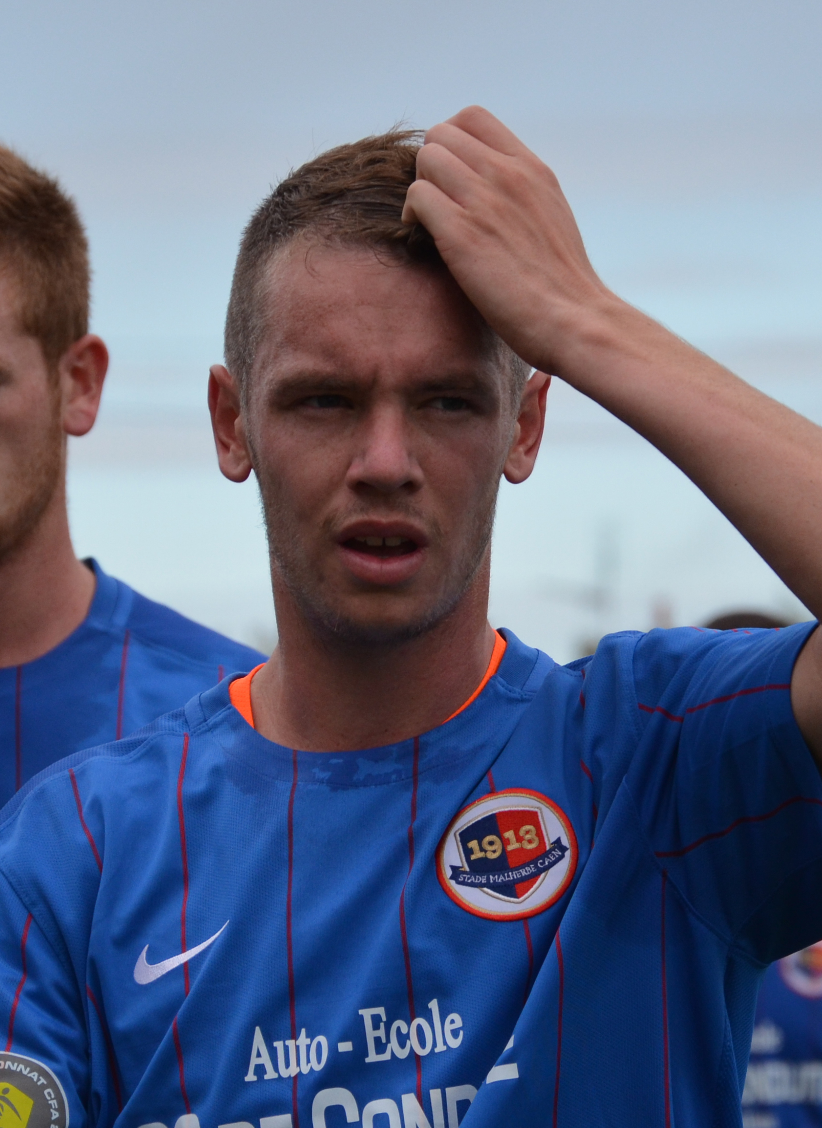 Photographie prise lors d'un match amical opposant les équipes réserves du Stade Malherbe de Caen et du Stade rennais sur l'un des terrains annexes du stade de Venoix le 13 septembre 2015. Ici, Jonathan Beaulieu.